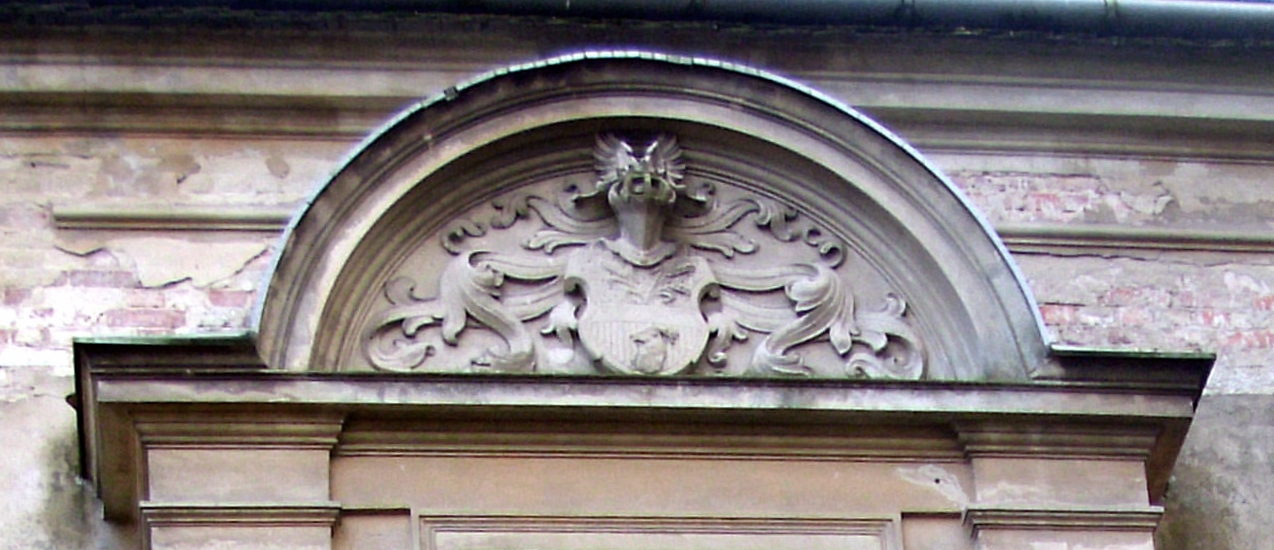 Wappen derer von Witte am Schloss in Ragow, Gemeinde Ragow-Merz, Brandenburg